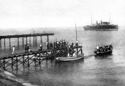 «Ленин» — грузо-пассажирский пароход типа «Пенза», построен в Данциге в 1909 году. Первоначальное название — «Симбирскъ».